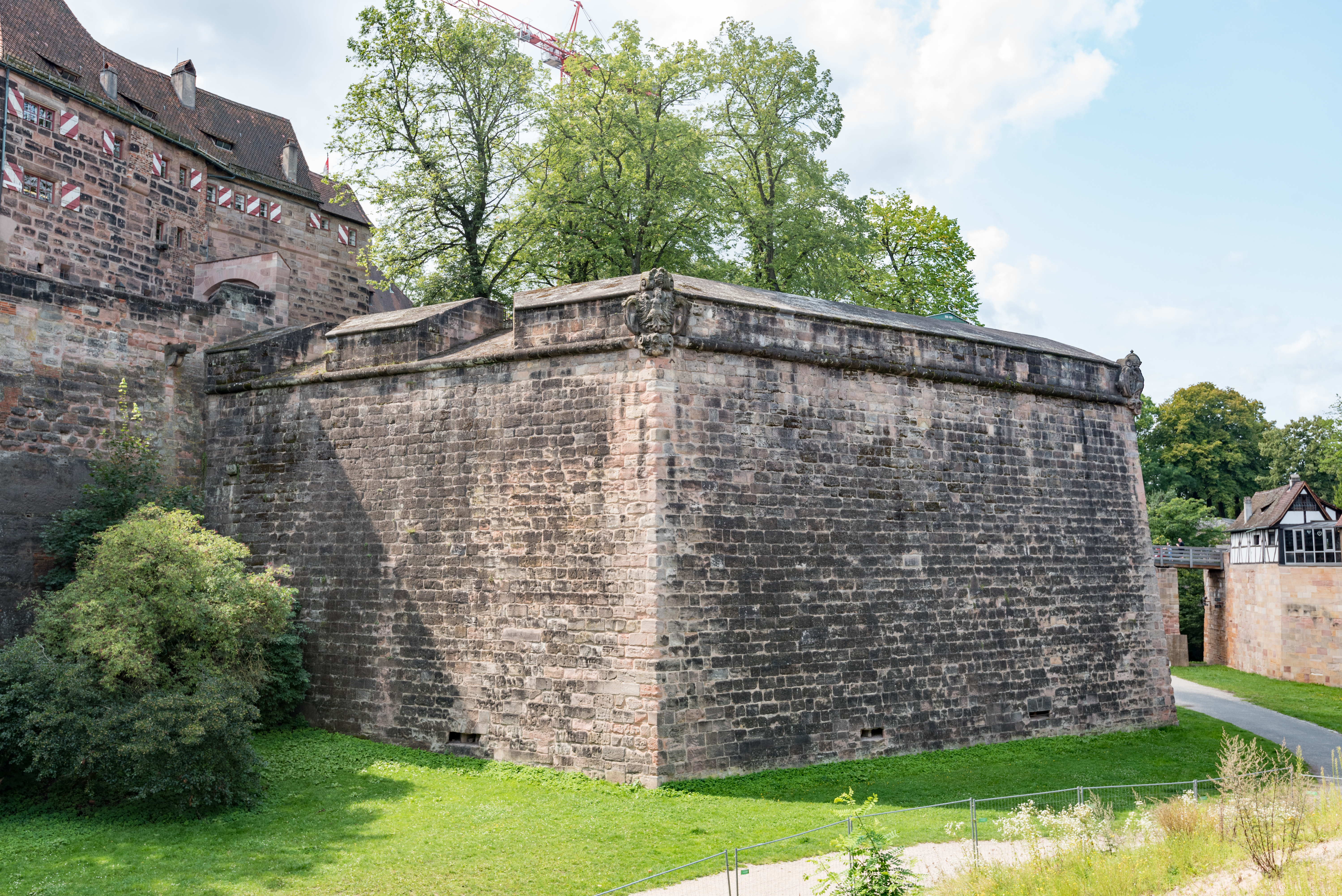 Nürnberg, Stadtbefestigung, Burgbasteien